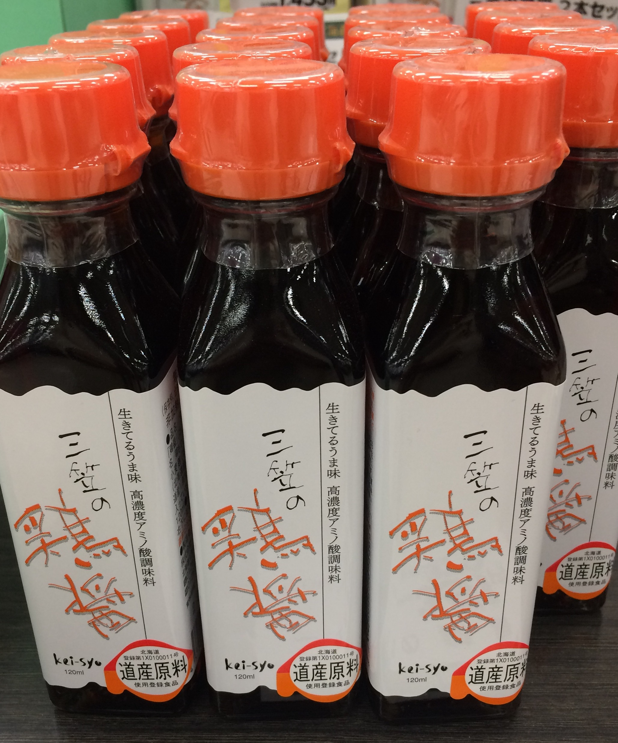 北海道三笠で生産される醤油。石炭ザンギに使われる。